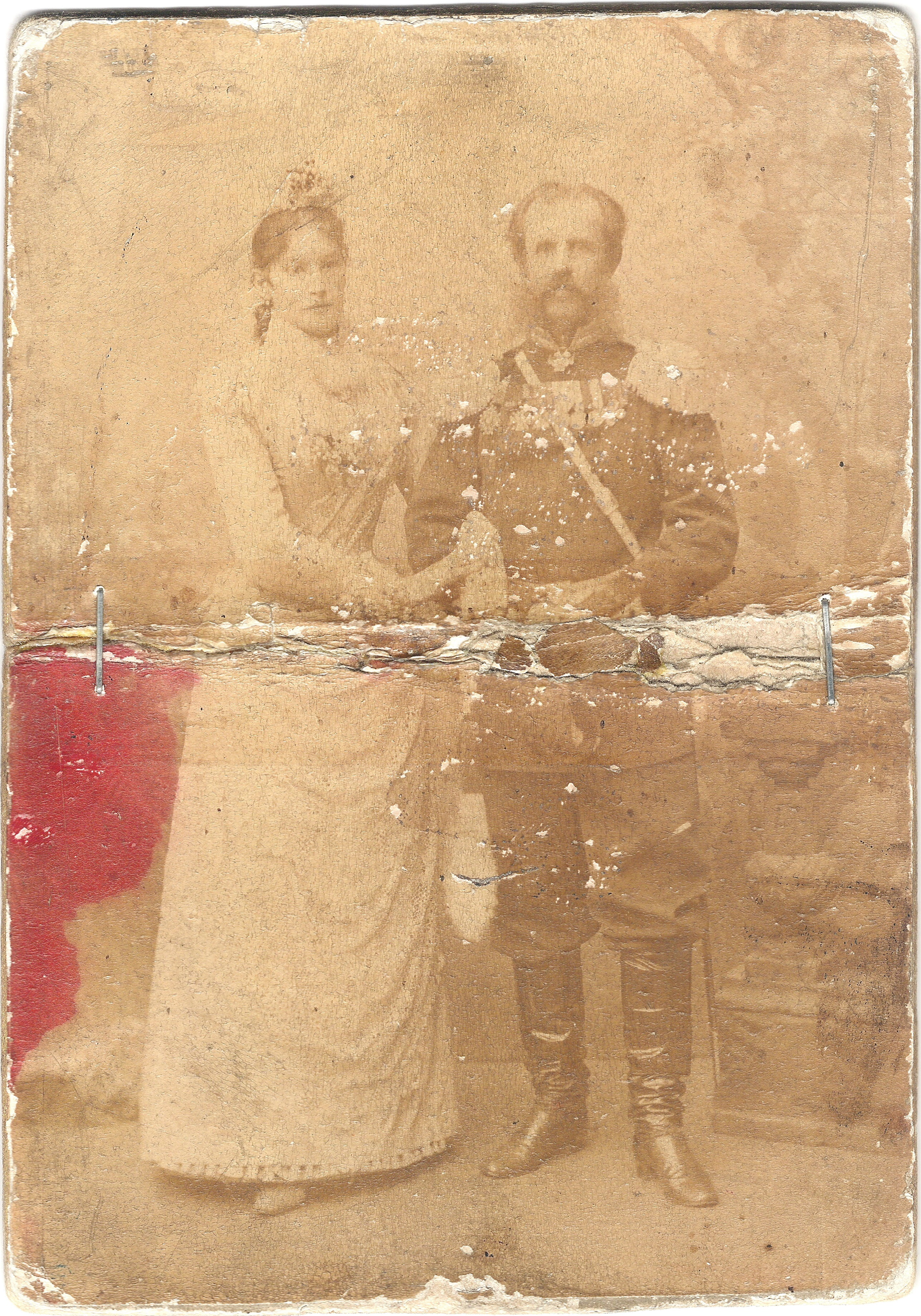 Generał-major Piotr Raftopuło z żoną, Ludwiką z Witkowskich,, sfotografowany w Warszawie, wtedy jako pułkownik Wołyńskiego Pułku Lejbgwardii.